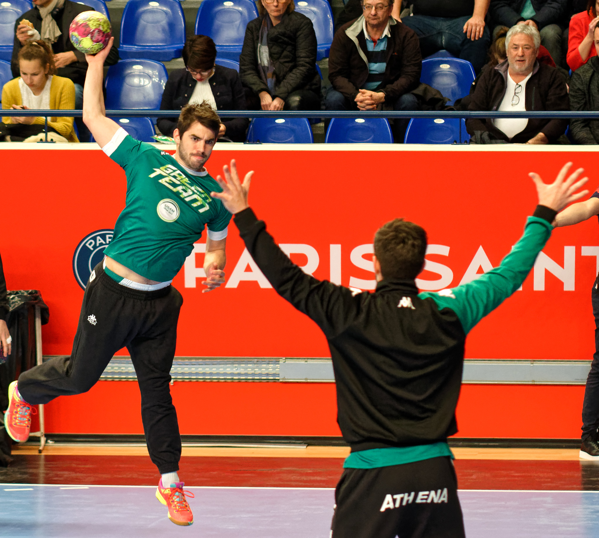 Rencontre de championnat de LidlStarLigue entre le PSG et Nîmes. A Coubertin, le 8 février 2017.